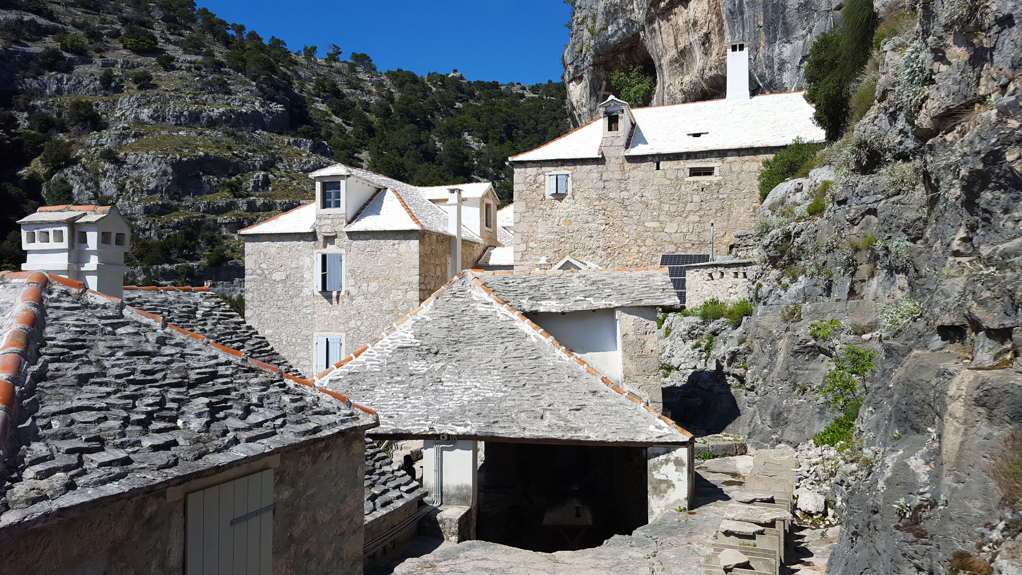 Pustinja Blaca